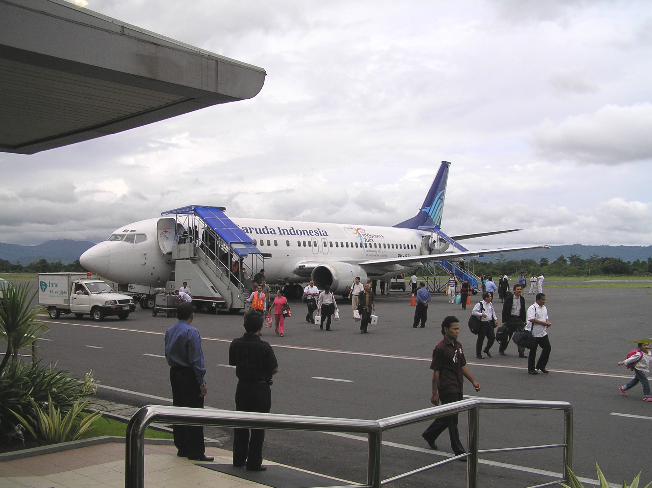 Passengers disembarking from a Garuda Indonesian Boeing 737 at Yogyakarta's Adisucipto Airport